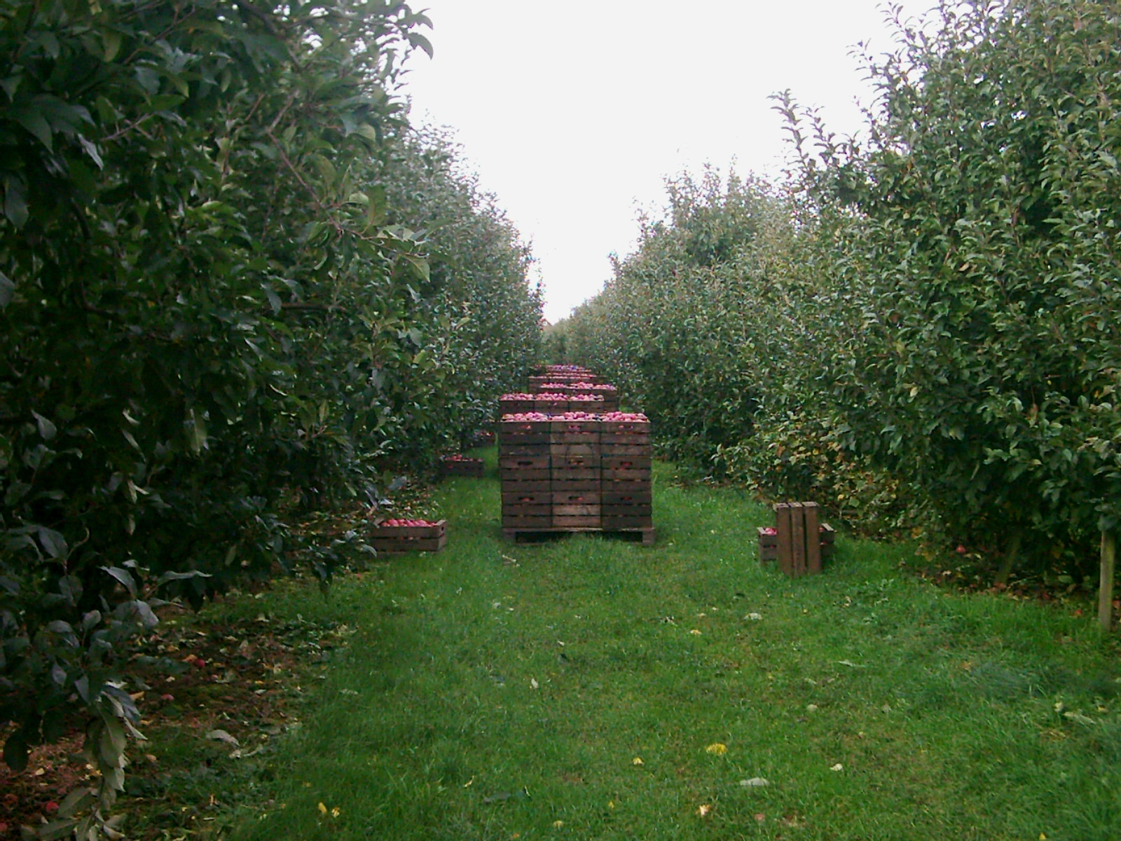 Apfelernte in Rübke, Altes Land.